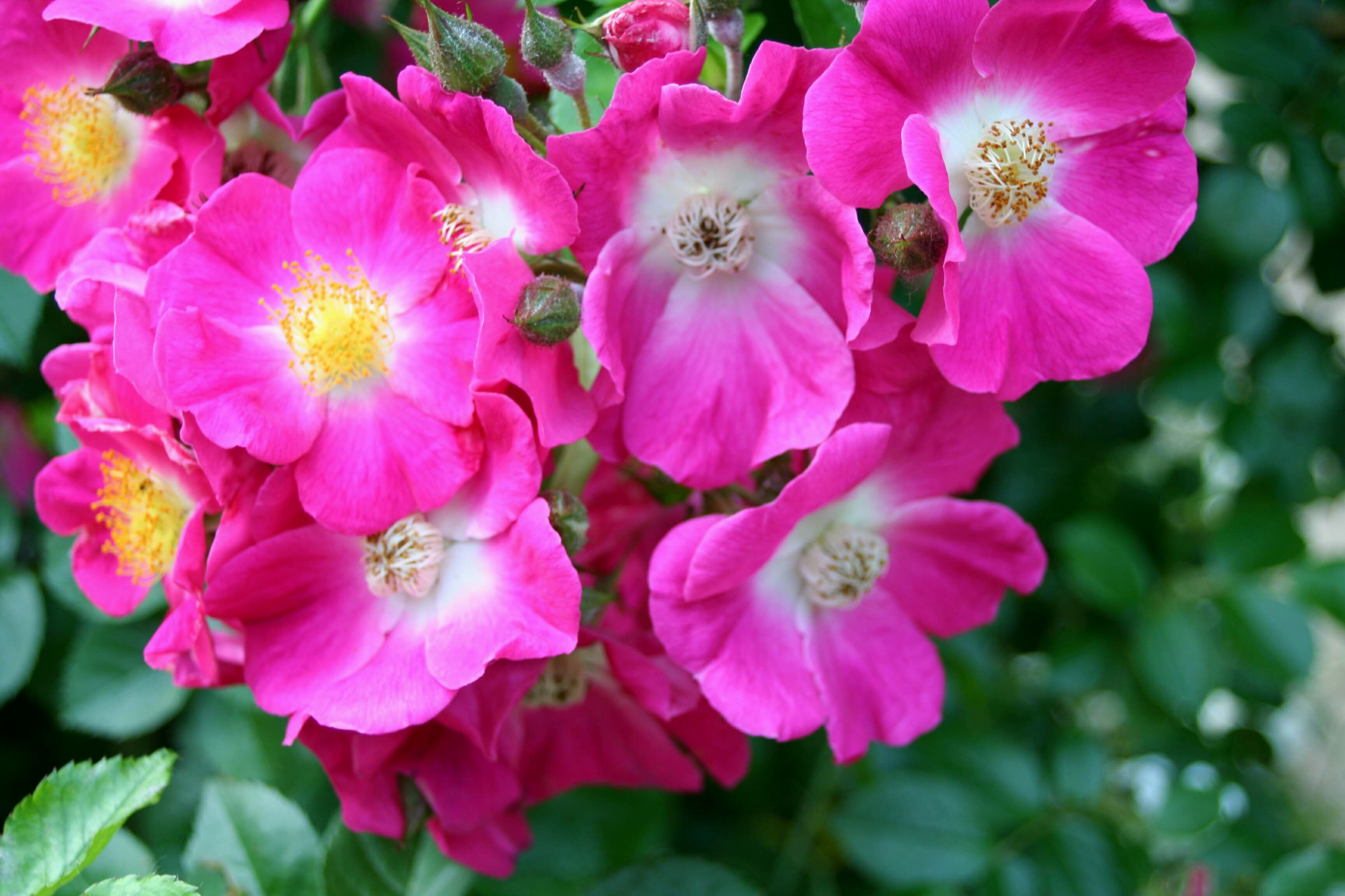 Rose 'American Pillar' photographiée dans le jardin de Claude Monet à Giverny - Eure (France)